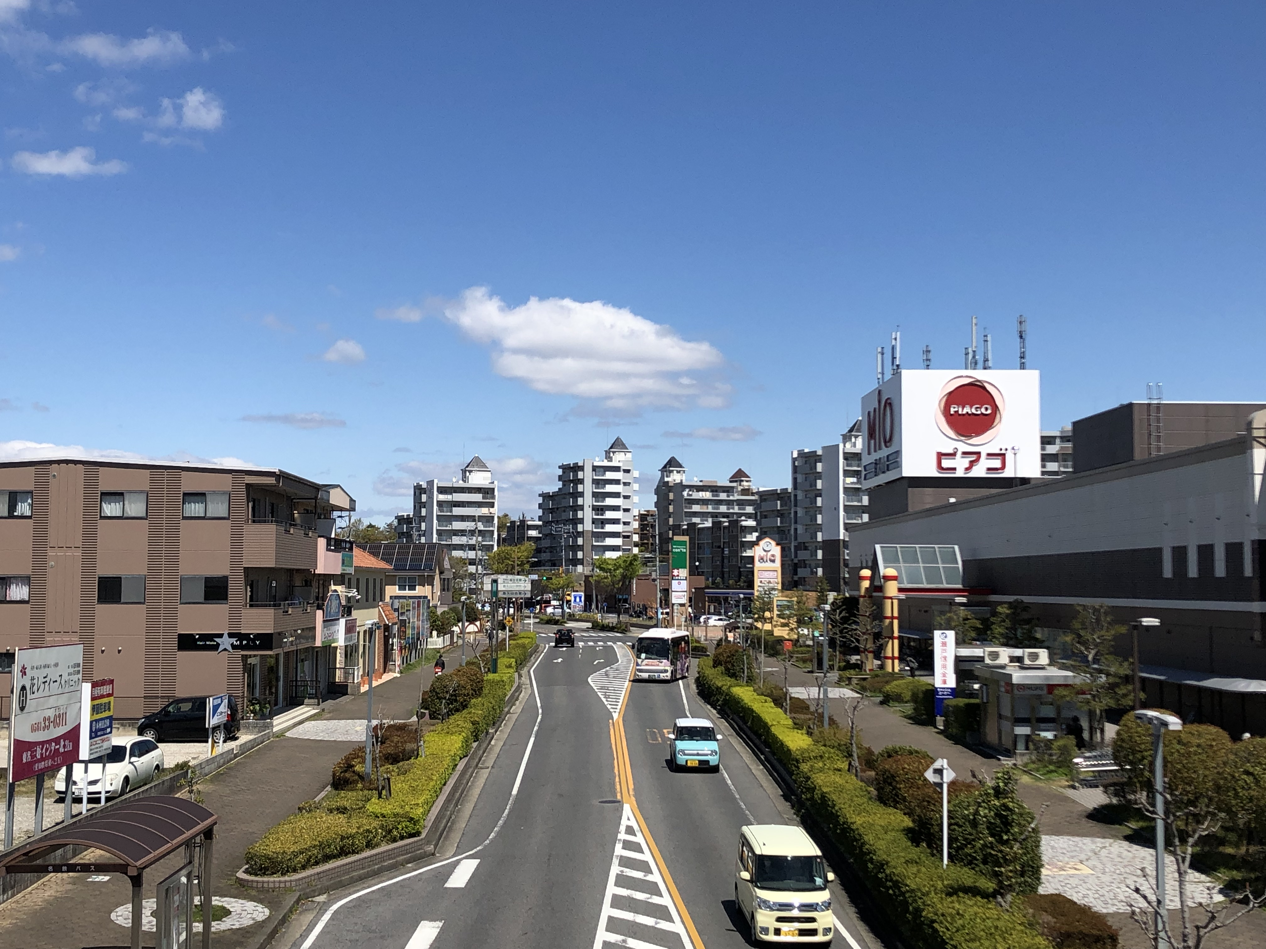 日進市香久山5丁目の街路。右手は「MIO香久山ショッピングセンター」。